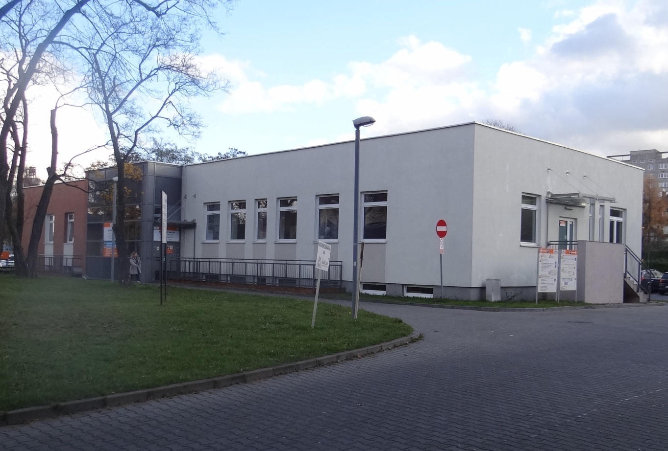 Budynek administracji szpitala SPWZOZ w Stargardzie